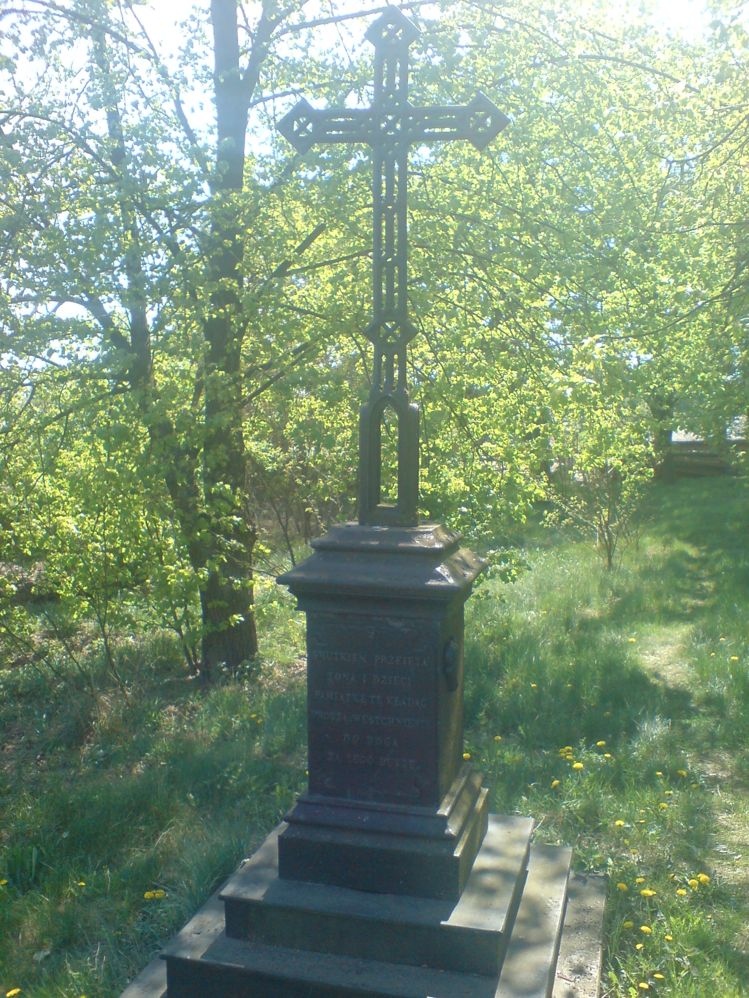 Żeliwny nagrobek z poł. XIX w.